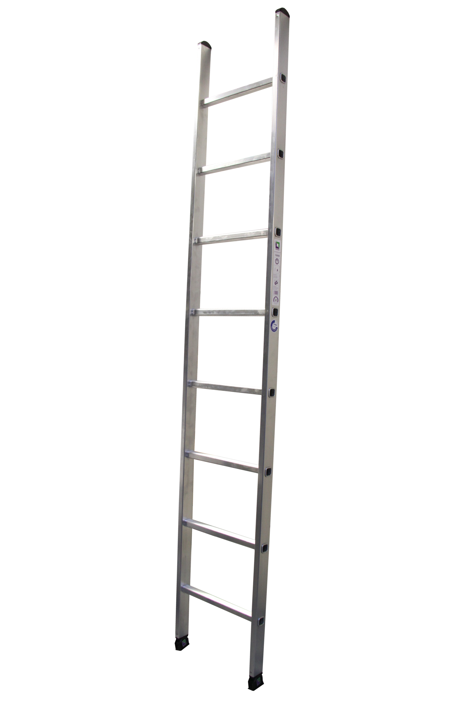 Een moderne ladder gecertificeerd volgens de norm EN-131